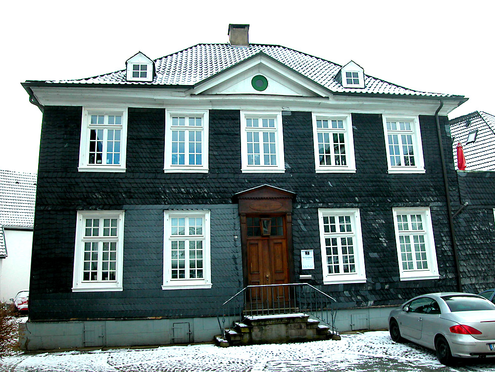 Heimatmuseum, Herdecke